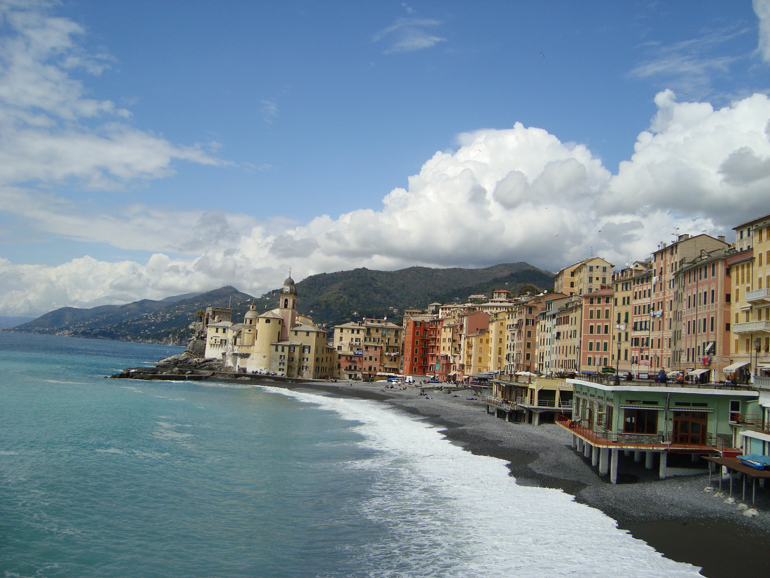 Camogli